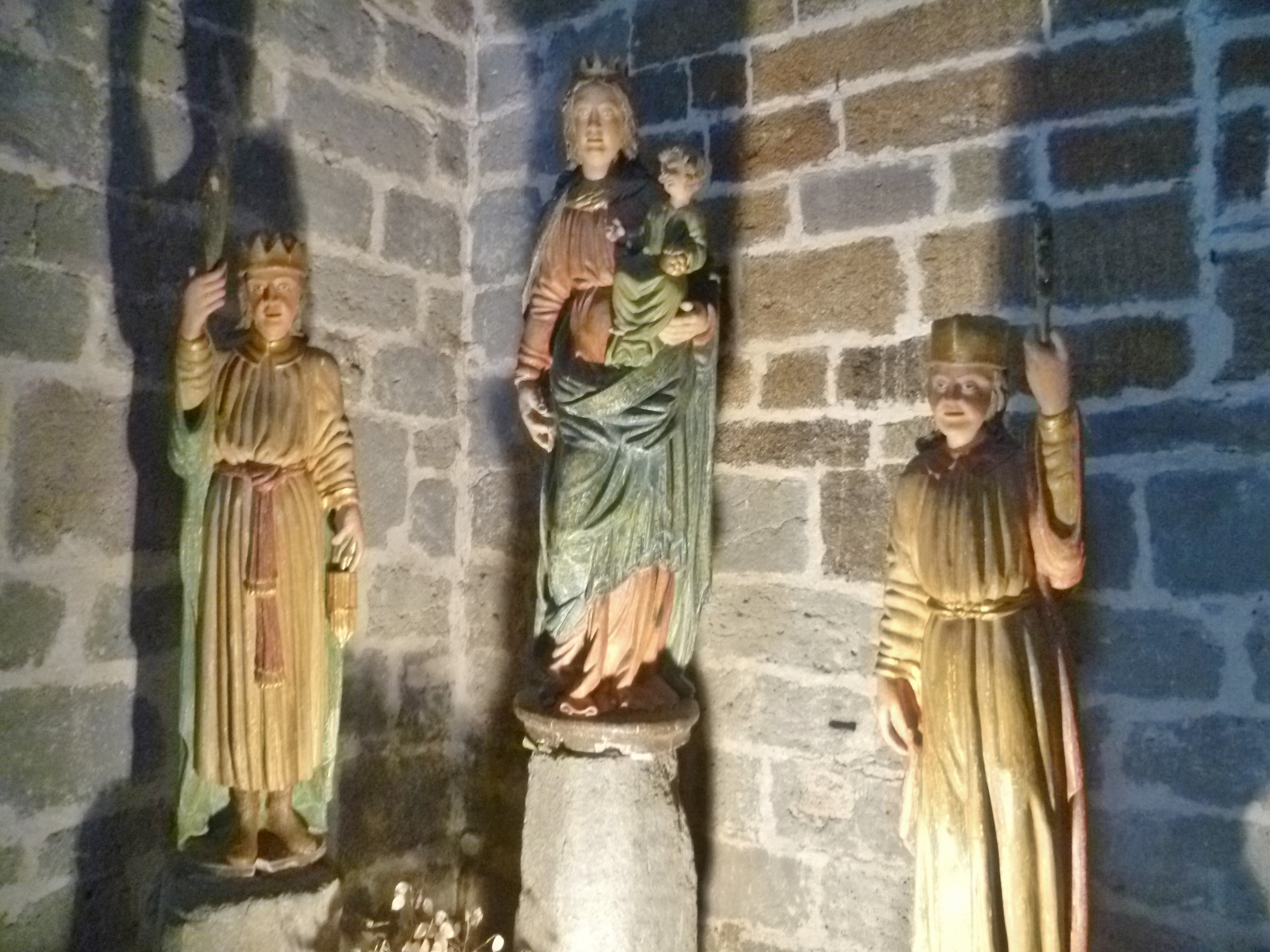 Église Notre-Dame-des-Pauvres (Saint-Chély-d'Aubrac, Aveyron, France)